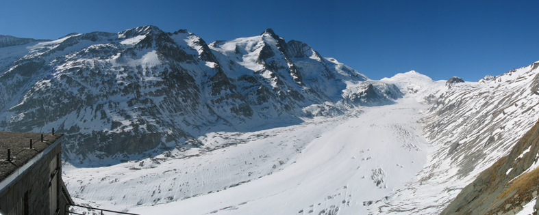 Pasterze Gletscher